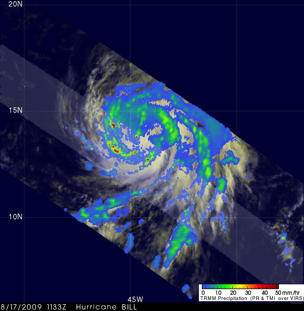 Proyección del Huracán Bill, apenas fué declarado ciclón tropical, realizado por NASA